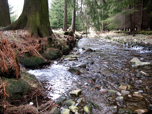 Pöhlwasser between Ehrenzipfel and Rittersgrün